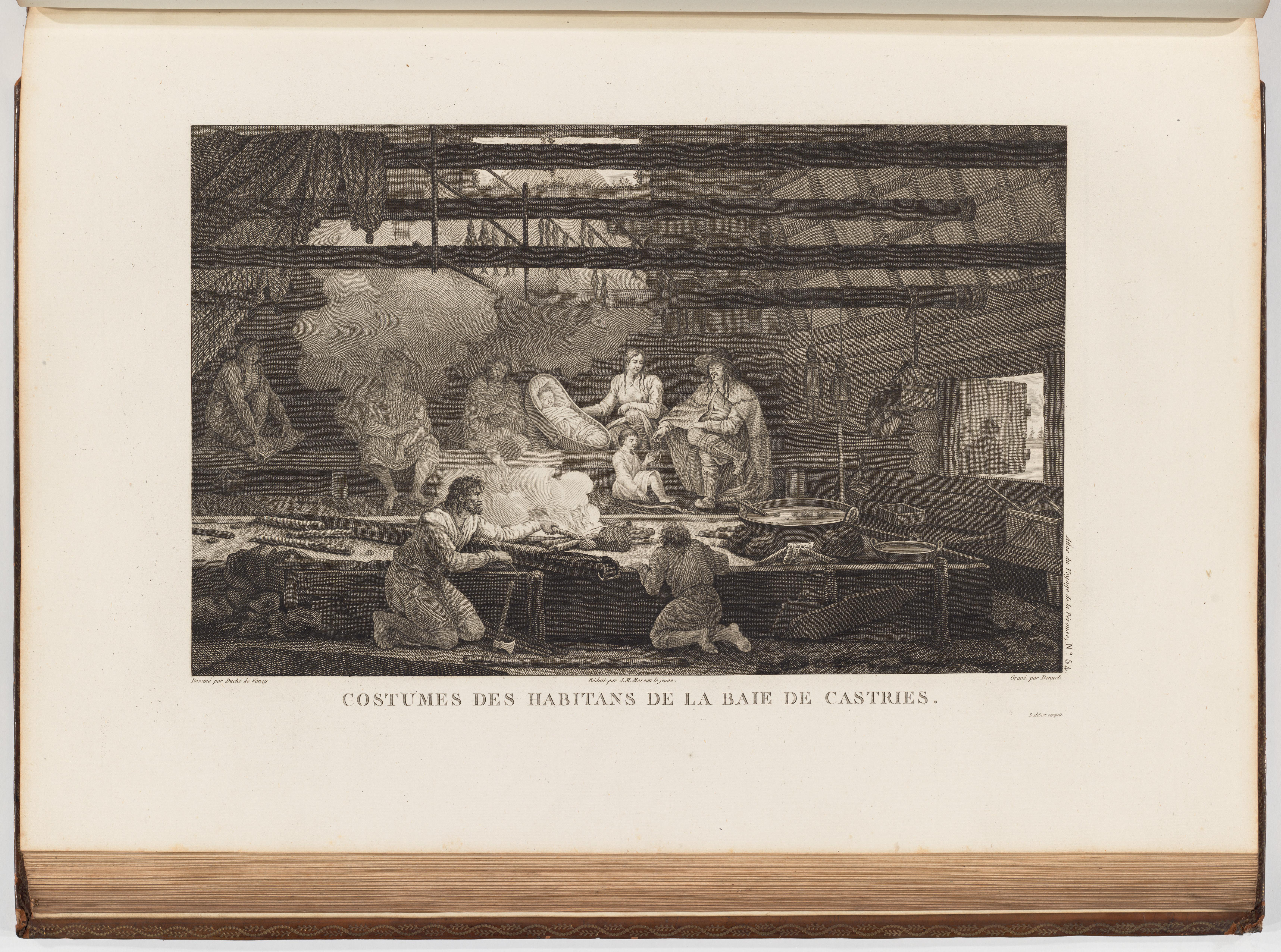 Voyage de La Pérouse autour du monde /publié conformément au décret du 22 avril 1791, et rédigé par L.A. Milet-Mureau.